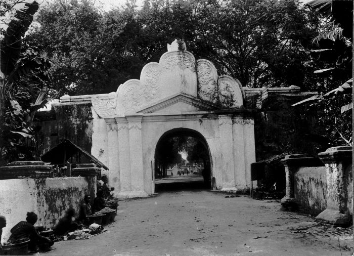 Foto. Vrouwen met koopwaar langs de weg die leidt naar de poort van de kraton in Jogjakarta.